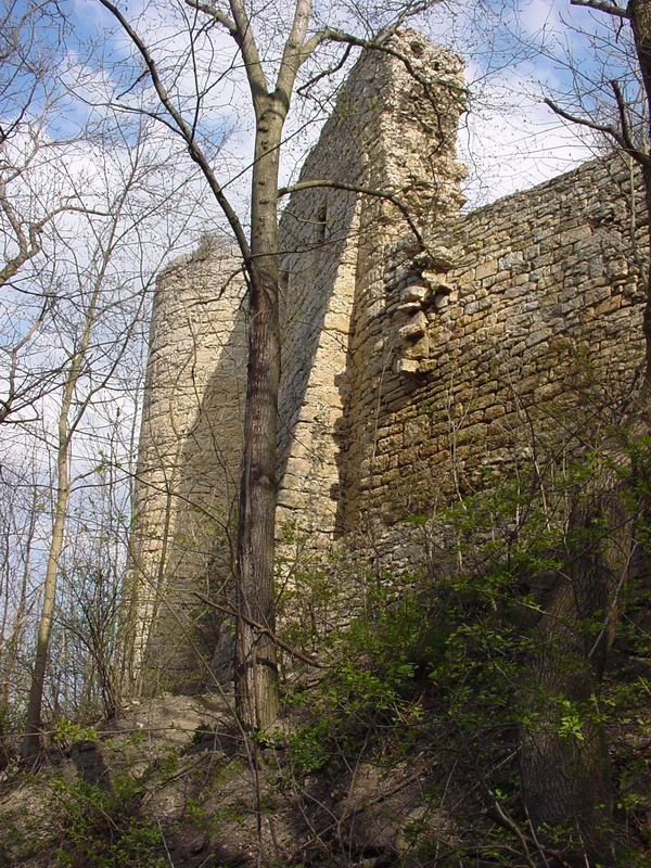 Gleißburg, public domain, eigenes Foto Mewes 07:58, 13. Feb 2005 (CET)